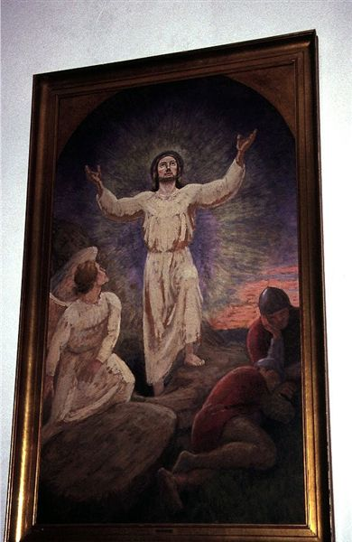 Damsholte Kirke Møn Kommune, Denmark; Maleri af Niels Skovgaard